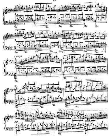 Estudios de Godowsky sobre los Estudios de Chopin.